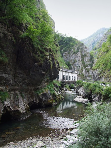 Orrido della Val Taleggio Picture taken by user Idéfix august 2006